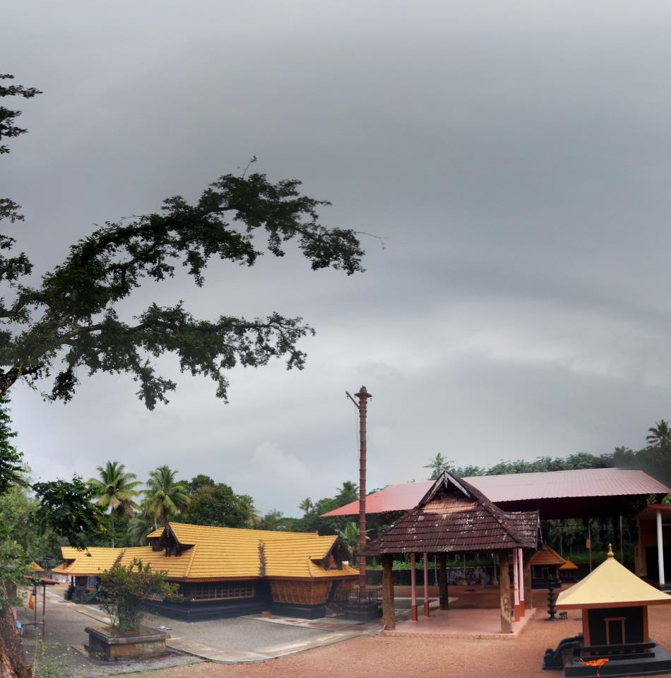 anikkattilammakshethram